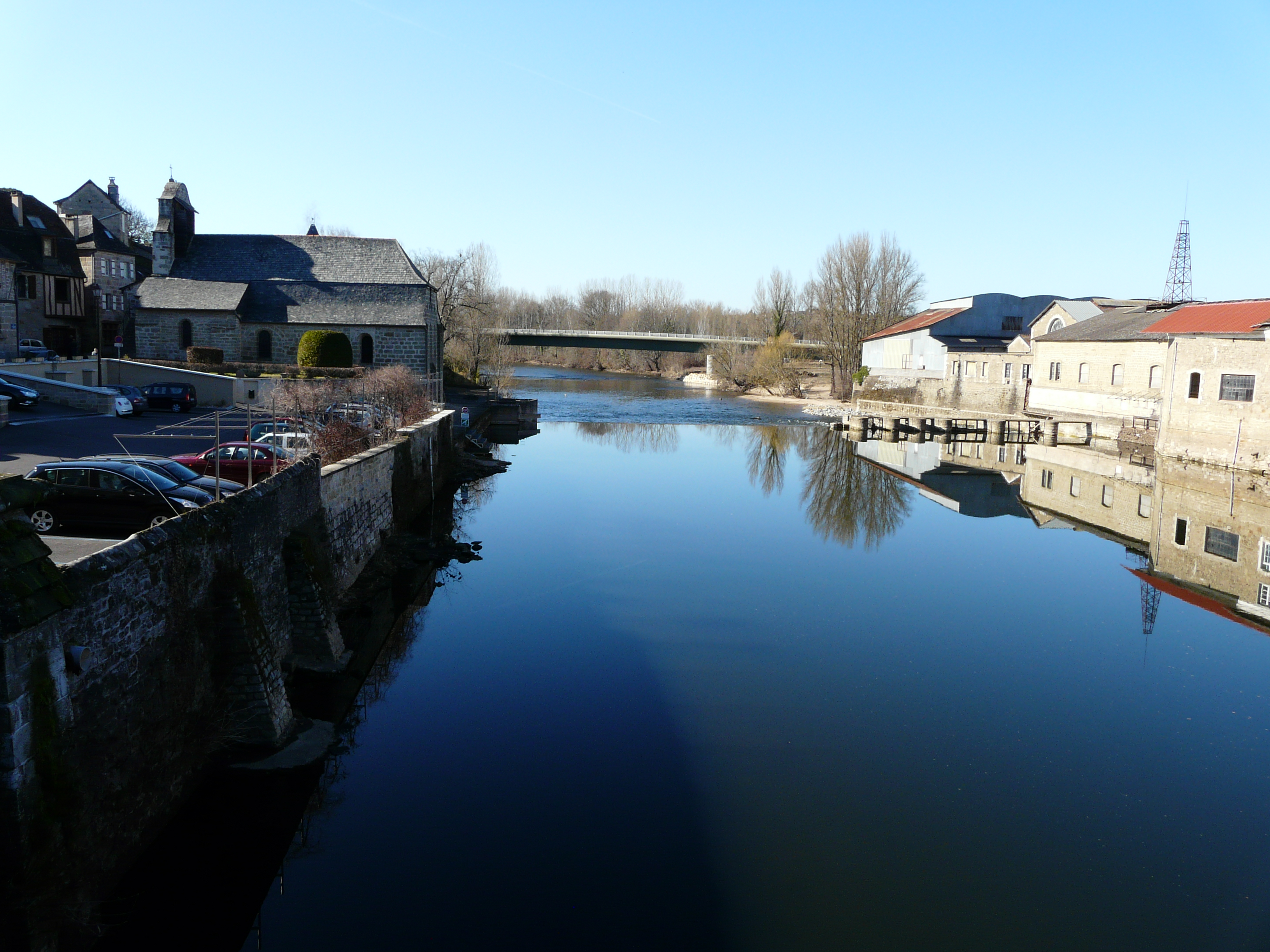 En aval du pont de la route départementale 19, la Vézère marque la limite entre Larche (à gauche) et Saint-Pantaléon-de-Larche (en rive opposée), Corrèze, France.